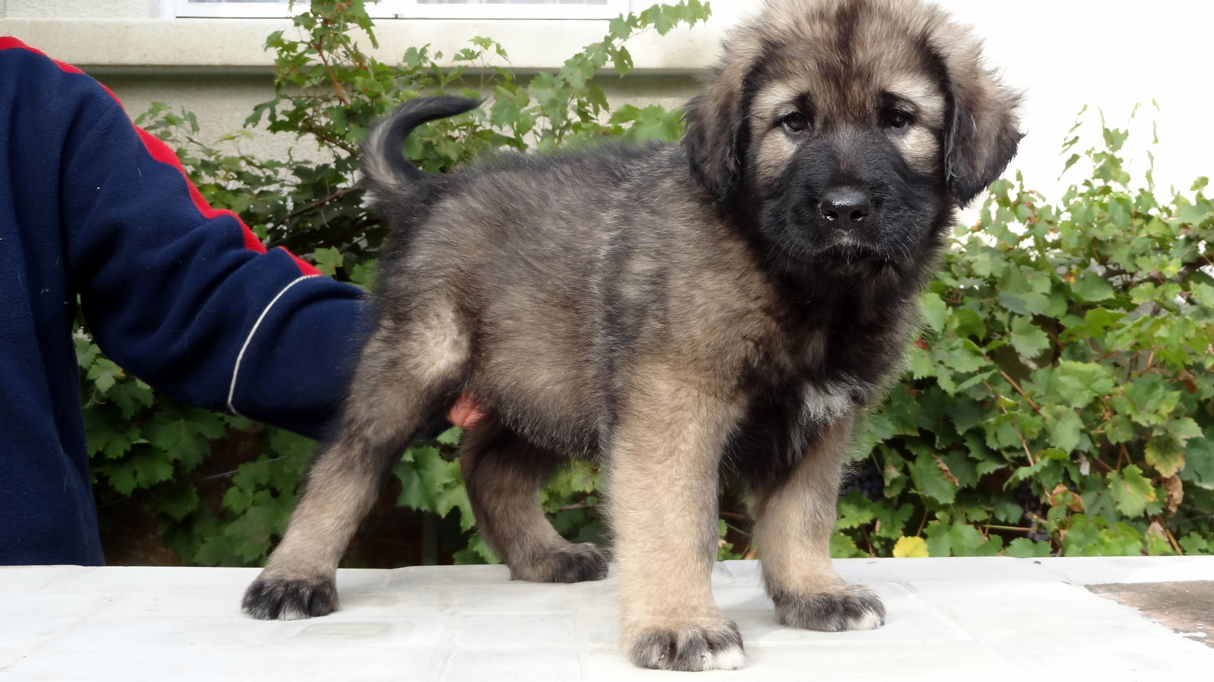 Sarplaninac kölyök 7. hetes, Római Mandula Kennelből, Zara X Gafur párosítás